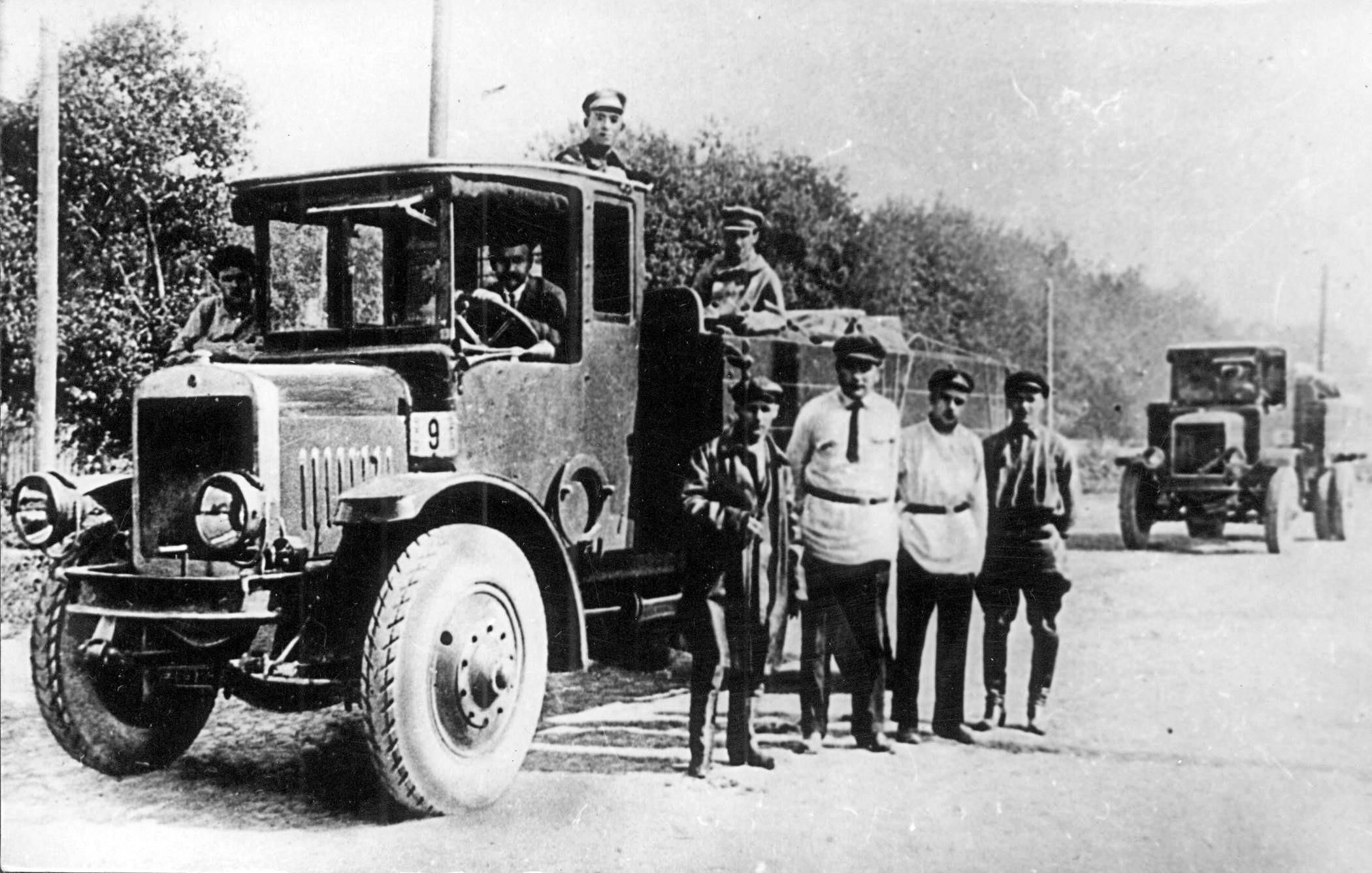 Грузовики Я-3 перед испытательным пробегом Ярославль-Москва-Витебск-Ленинград-Тверь-Москва-Ярославль. Высокий человек в косоворотке (второй слева) - директор ярославского автозавода Ф.А.Никитин. За рулём первого автомобиля - главный конструктор ЯГАЗа Владимир Васильевич Данилов. Июнь 1926 года.